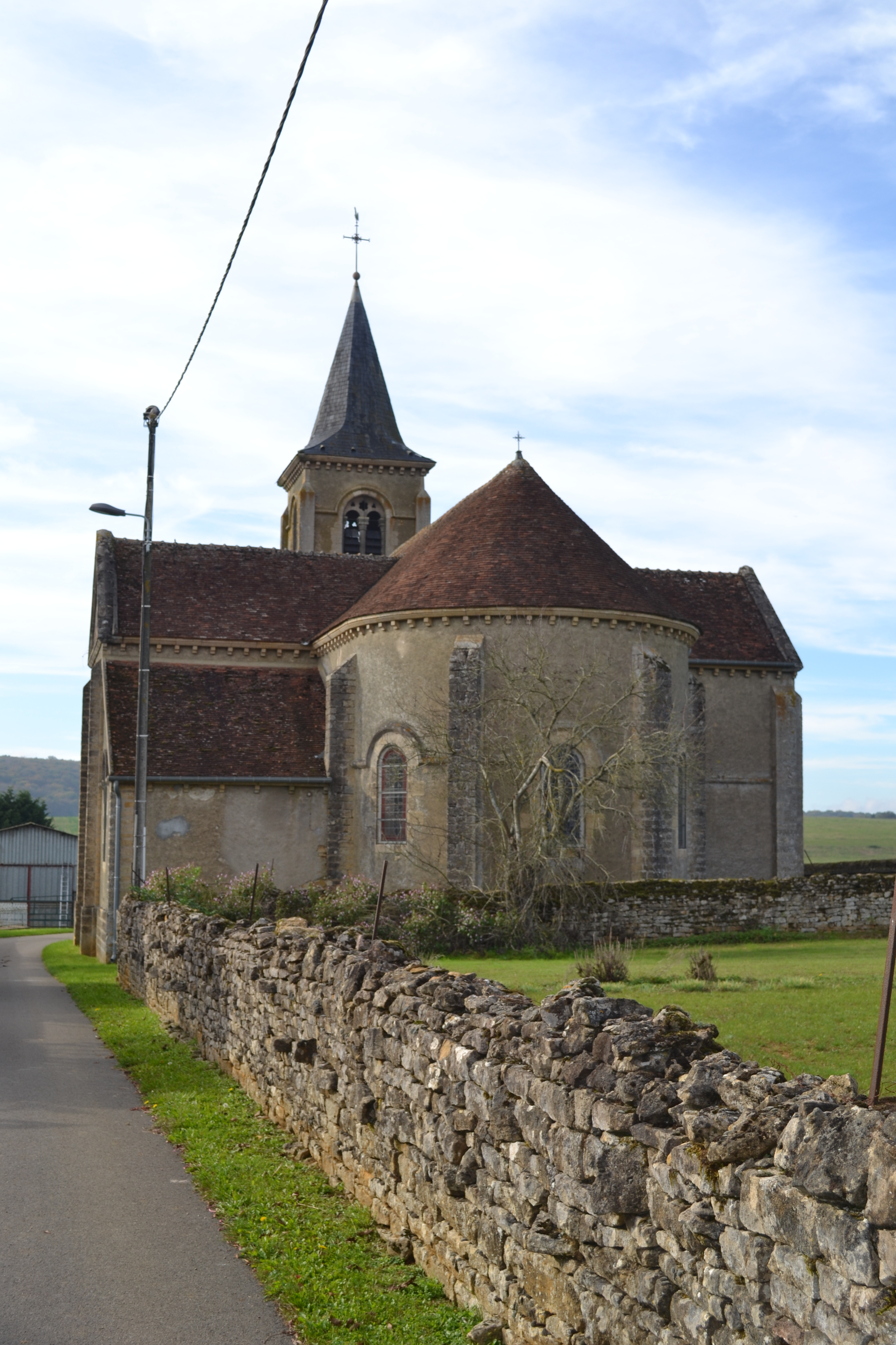 Eglise d'Arzembouy (Nièvre).